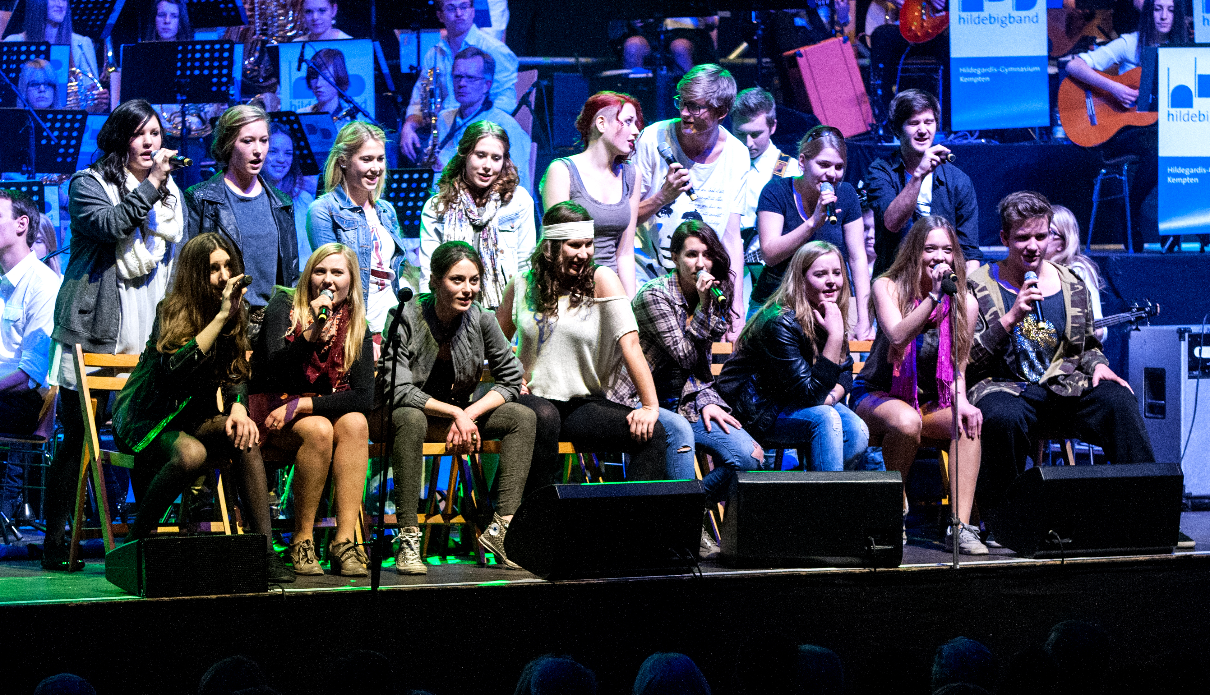 Konzert in der BigBox Allgäu im Januar 2013